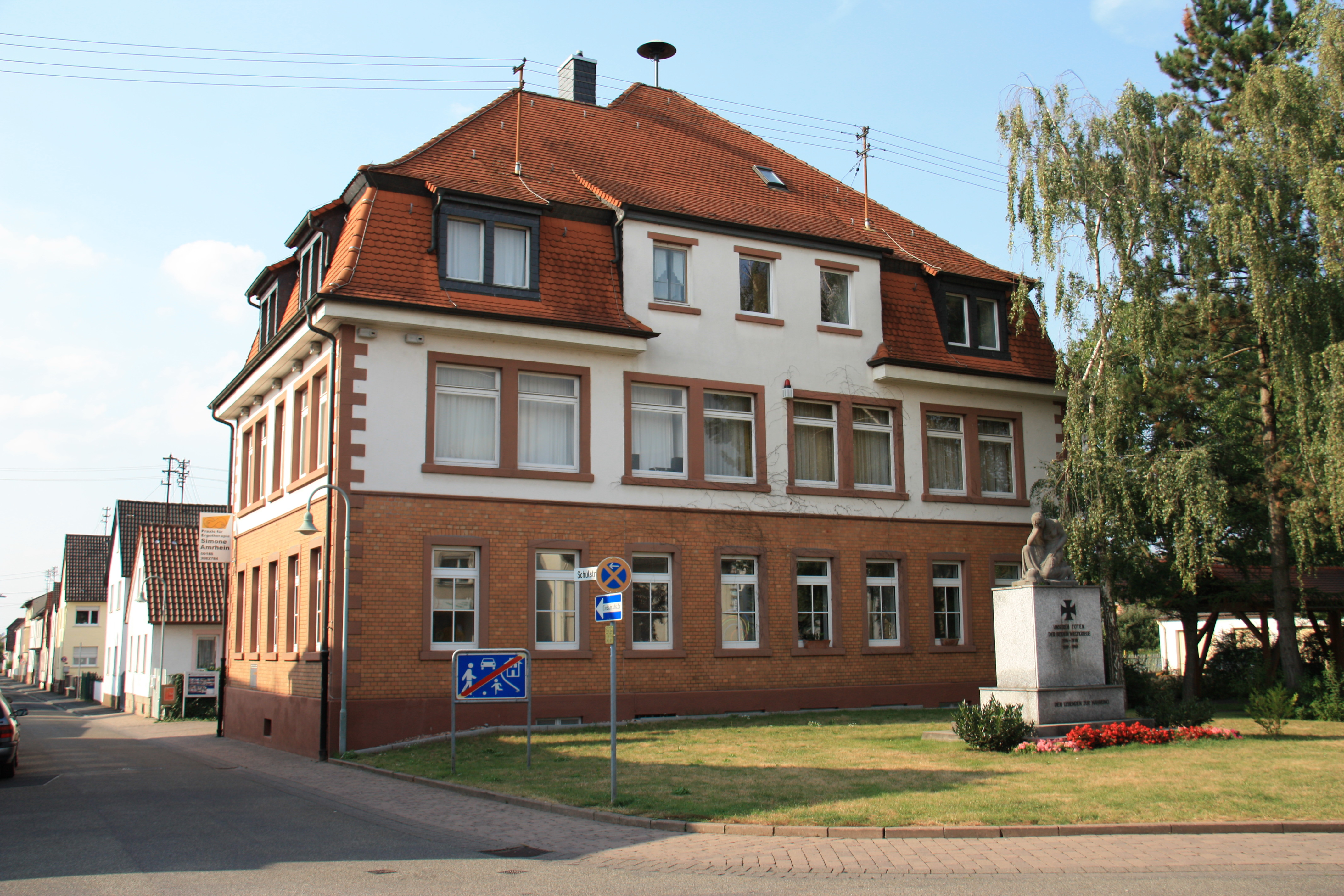 Das Alte Rathaus der Gemeinde Dettingen, die 1975 mit der Gemeinde Großwelzheim zur neuen Gemeinde Karlstein a.Main fusioniert ist. Heute ist im Alten Rathaus das Heimatmuseum von Karlstein untergebracht.